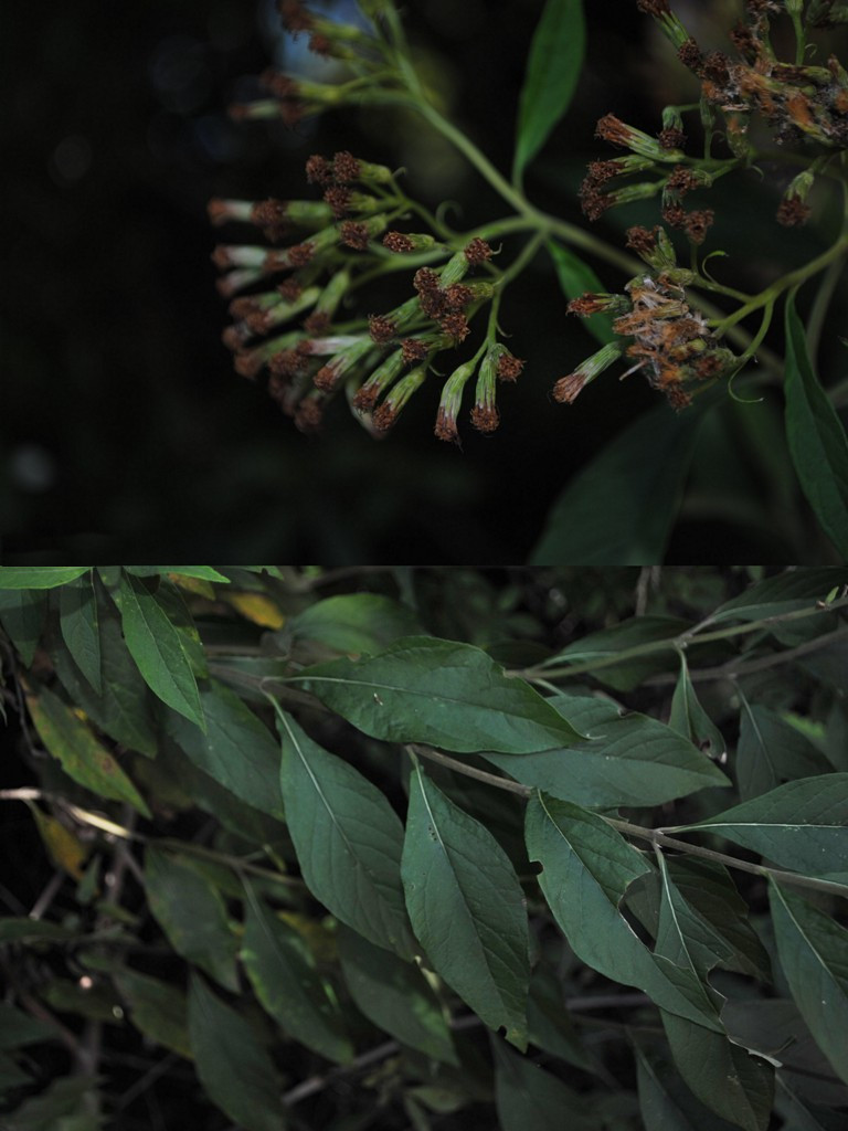 Eupatorium subintegerrimum. Asteraceae. Fotos tomadas bajo bosque ribereño al margen del Arroyo de la Jabonería en Valle Edén, departamento de Tacuarembó, Uruguay.